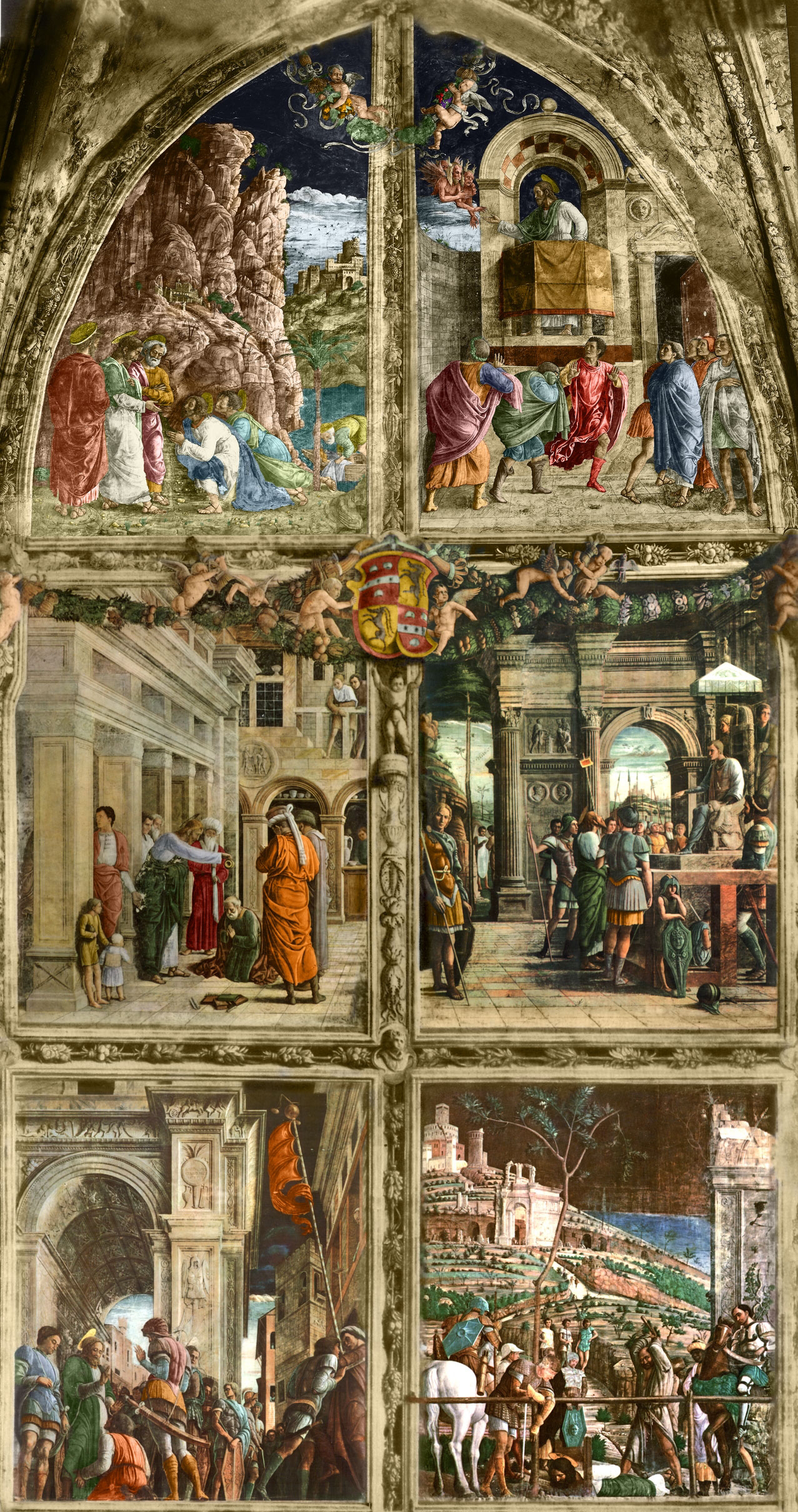 Ricostruzione digitale a partire da foto d'epoca realizzata da PST Galileo - Scuola Italiana Design